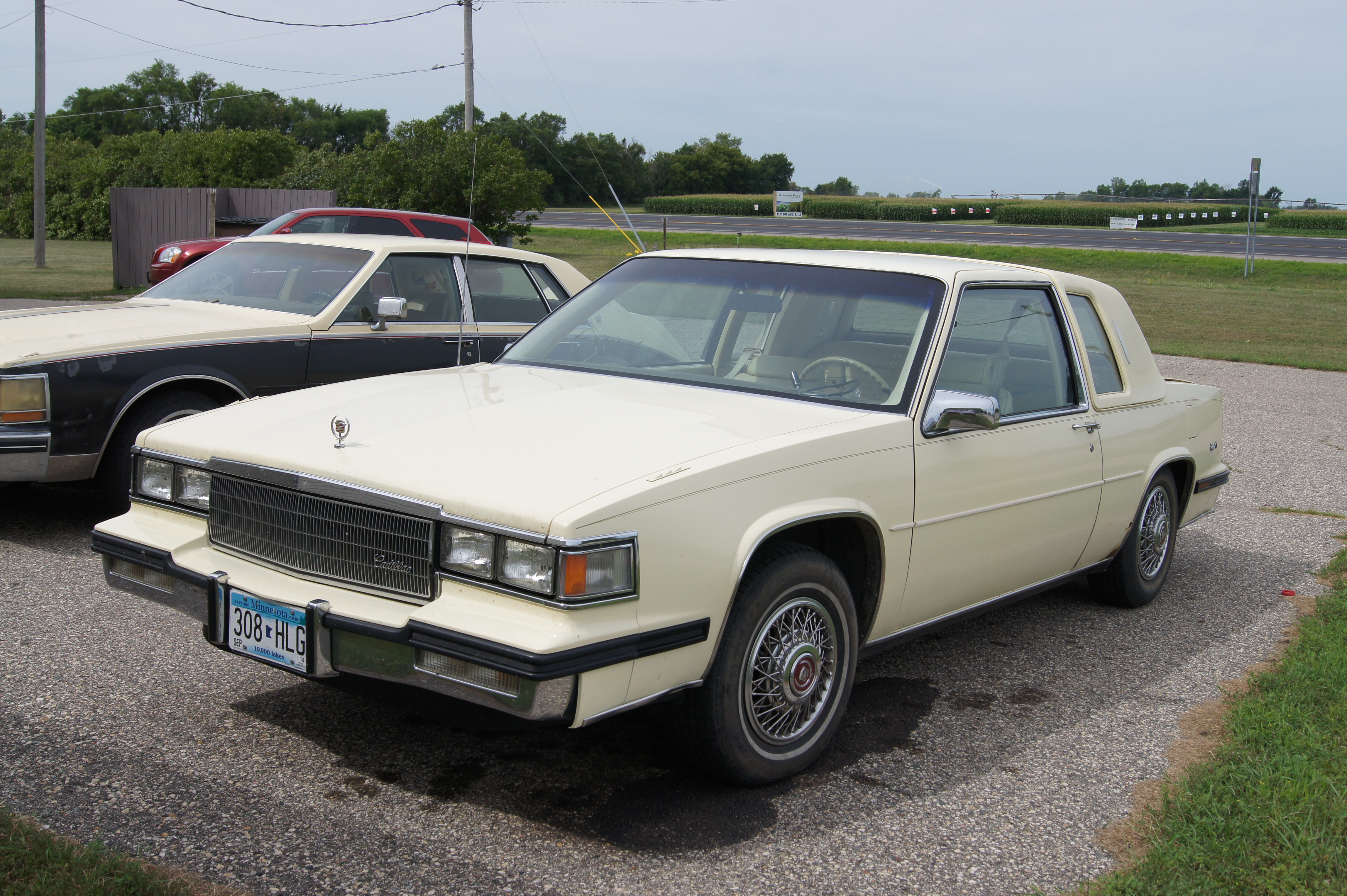 85 Cadillac Coupe de Ville